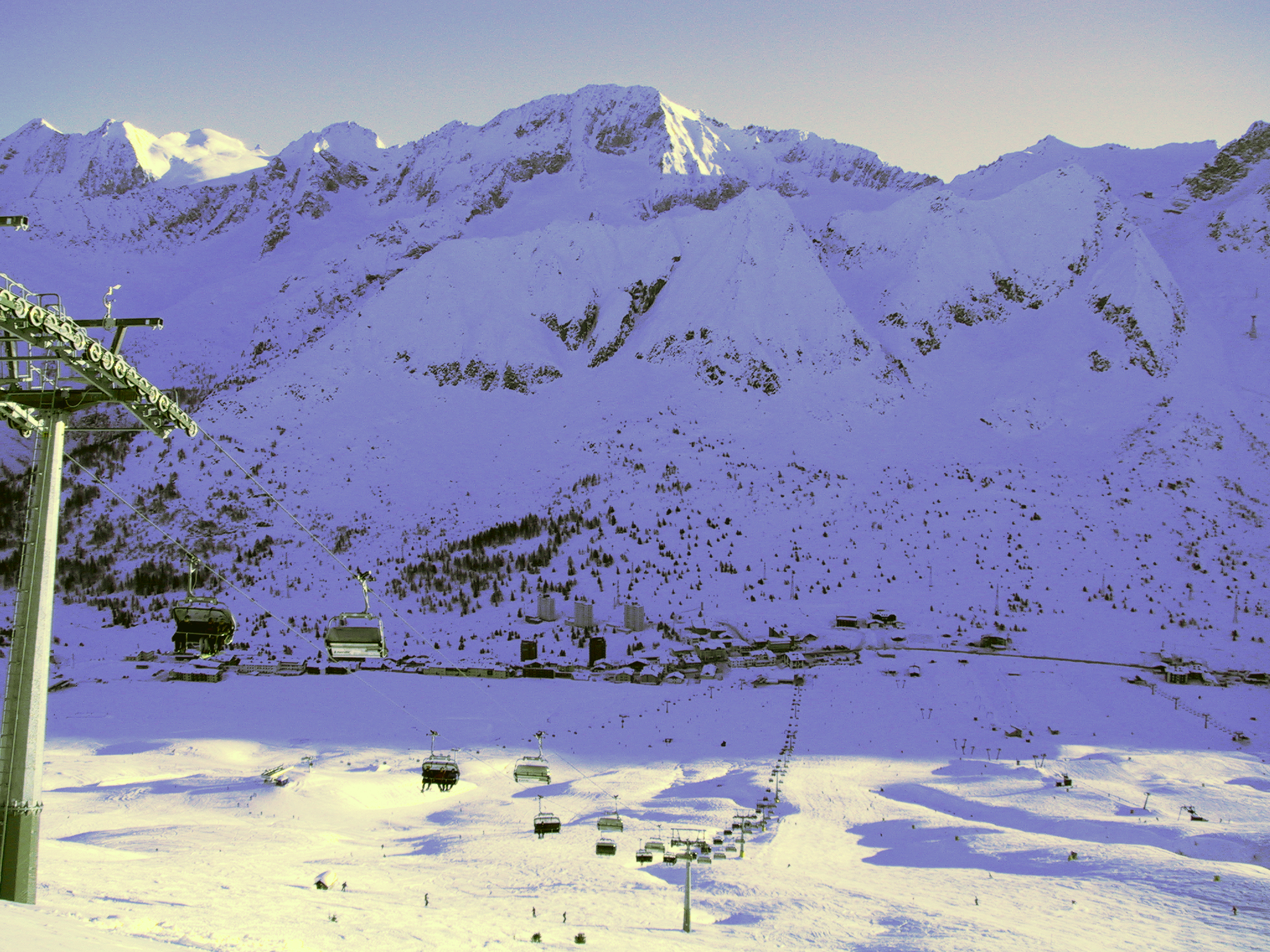 Il Passo del Tonale - Foto da me scattata nell'inverno 2002